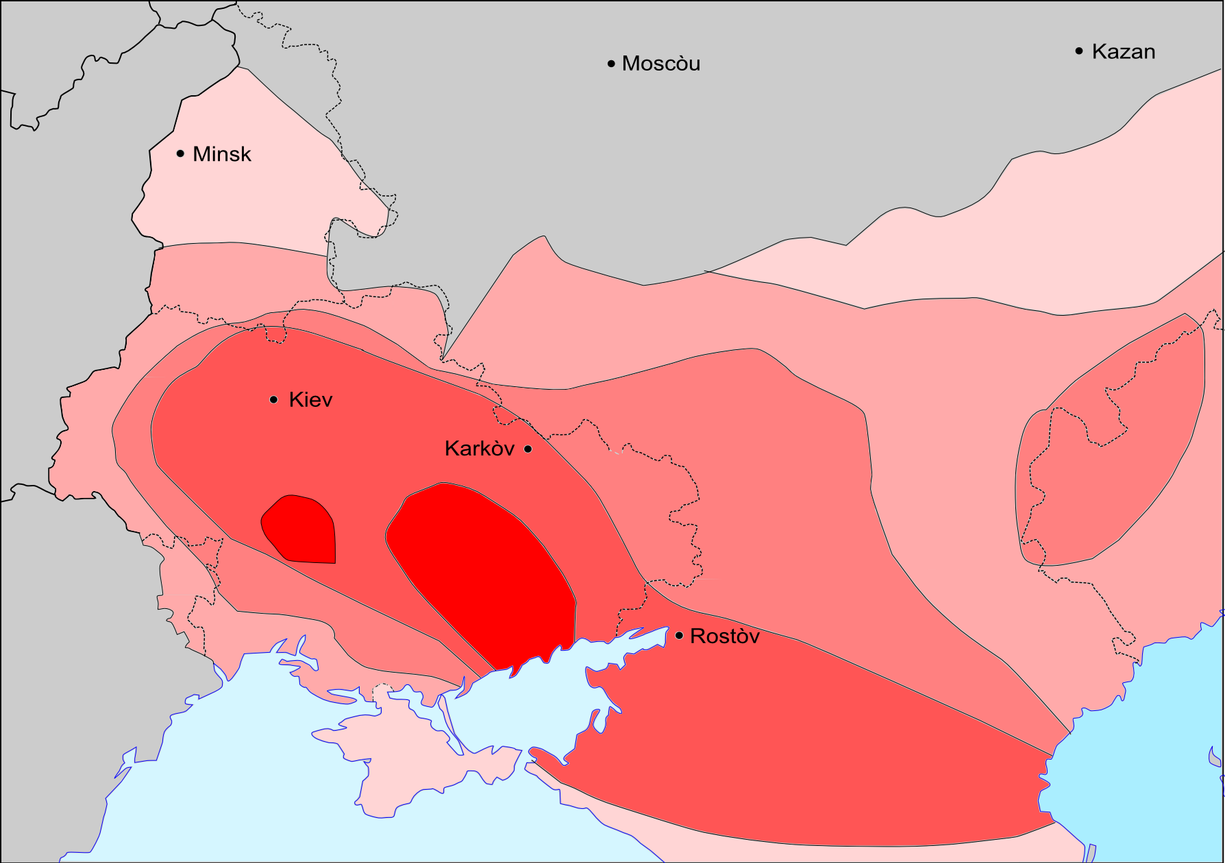 Intensitat de la famina de 1932-1933 en Union Sovietica.